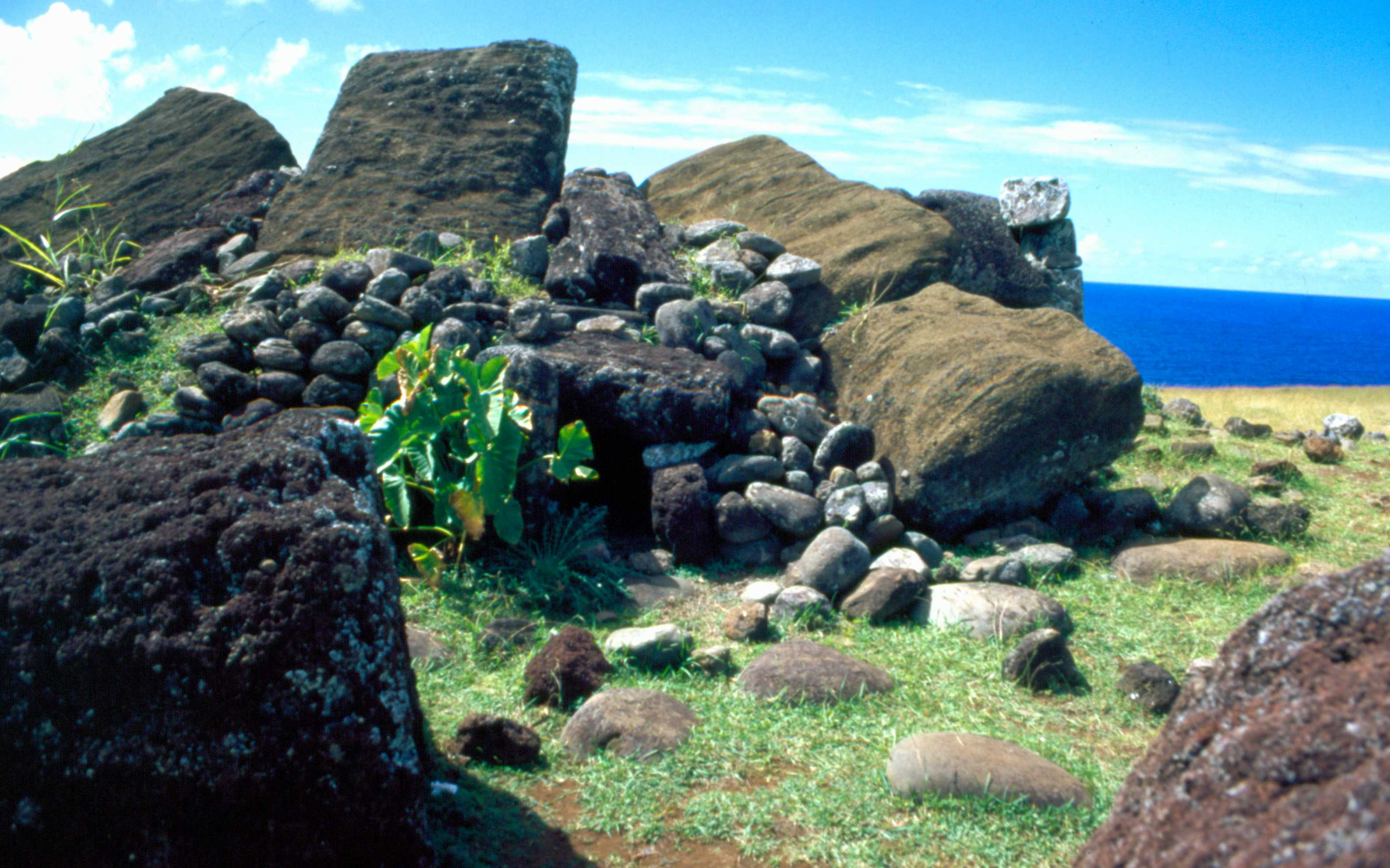 Ahu Aka Hanga auf der Osterinsel mit zerstörten Steinstatuen